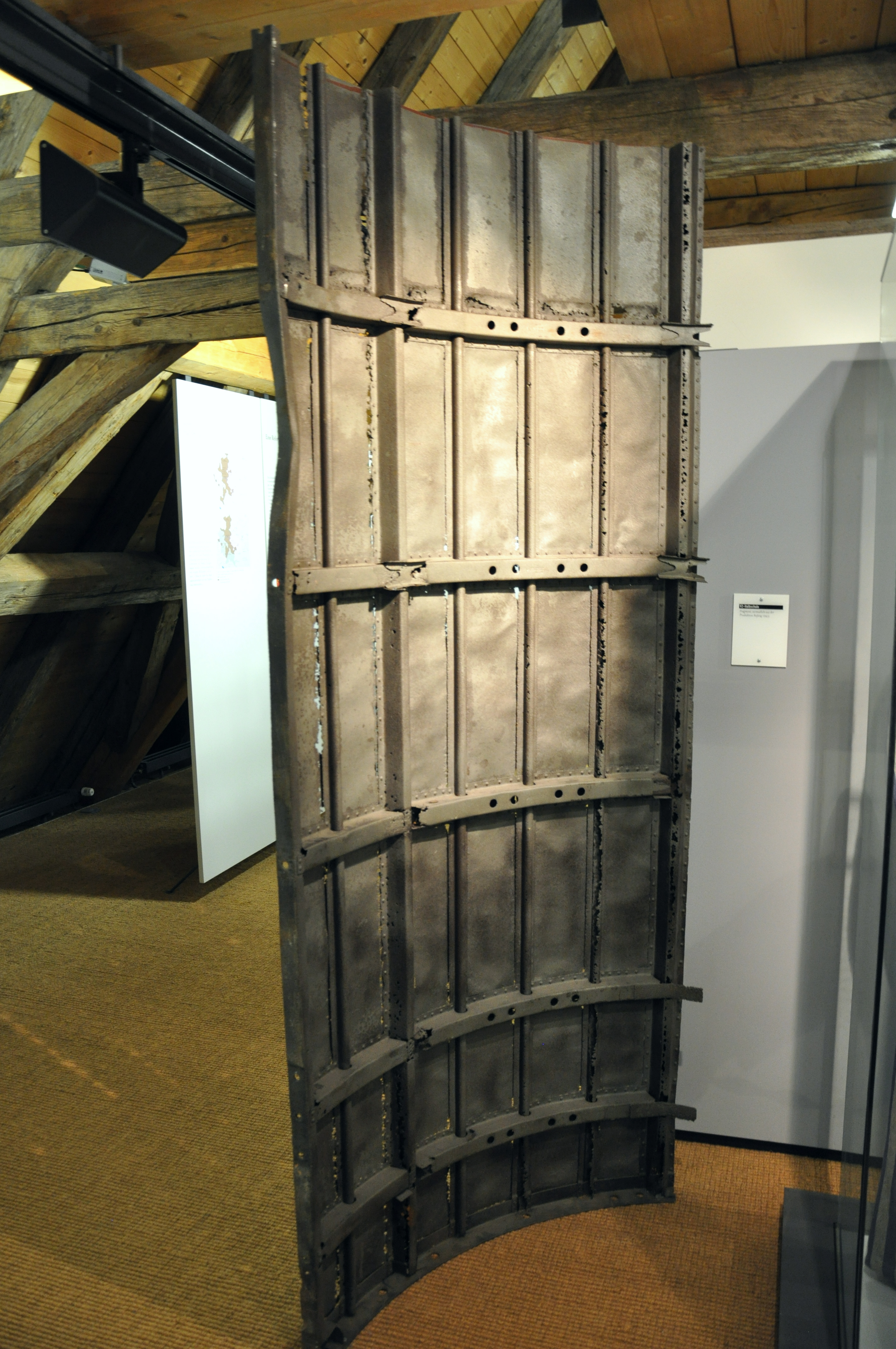 Fragment einer V2-Halbschale, KZ-Außenlager Saulgau, wohl aus der Produktion 1945; Stadtmuseum Bad Saulgau